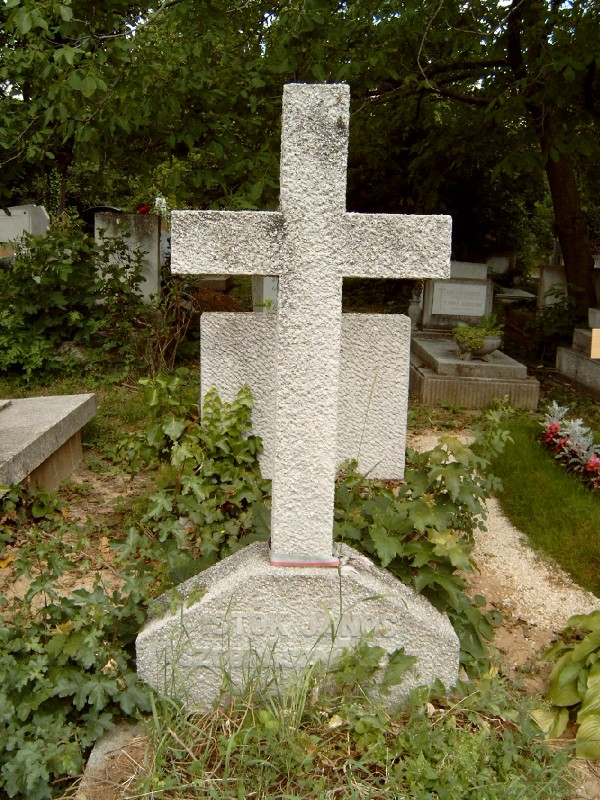 Istók János (Bácsfalu, 1873. június 15. – Budapest, 1972. február 22.) szobrász sírja Budapesten. Farkasréti temető: 11/1-1-346.